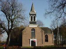 Kerkje Oud Avereest